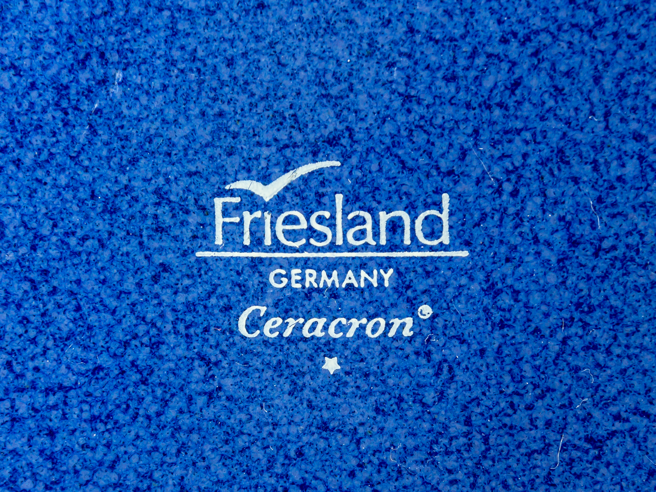 Flache Suppenschale, Service Ammerland blue, Bodenmarke auf der Rückseite, Friesland